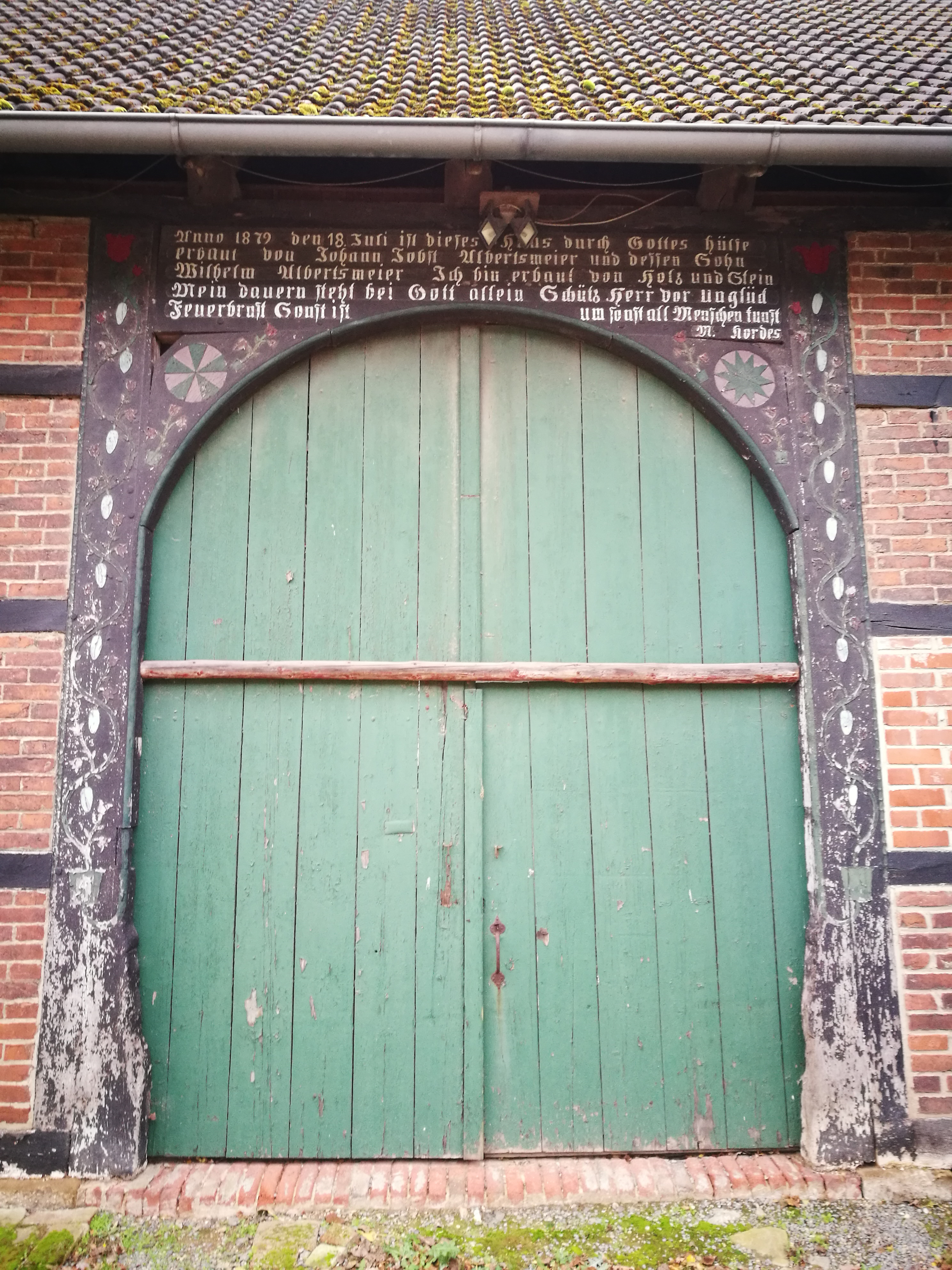 Deutschland (D) - Nordrhein-Westfalen (NW) - Kreis Lippe (LIP) - Bad Salzuflen - Wüsten: Hofanlage Albertsmeier, Torbogen der Leibzucht